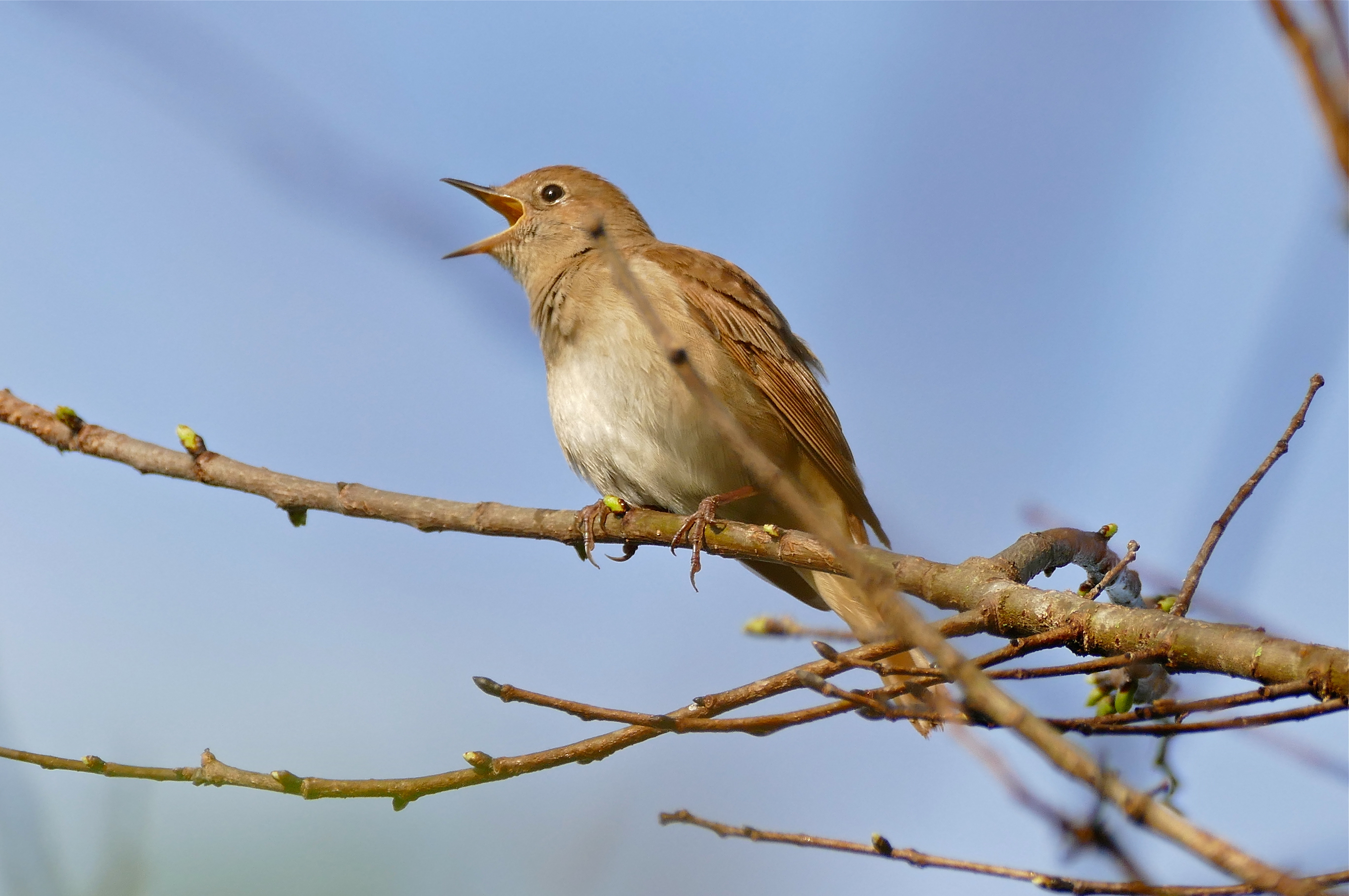 El Cortalet, Los Aiguamolls del' Empordà, Castelló d'Empúries, Catalunya, SPAIN